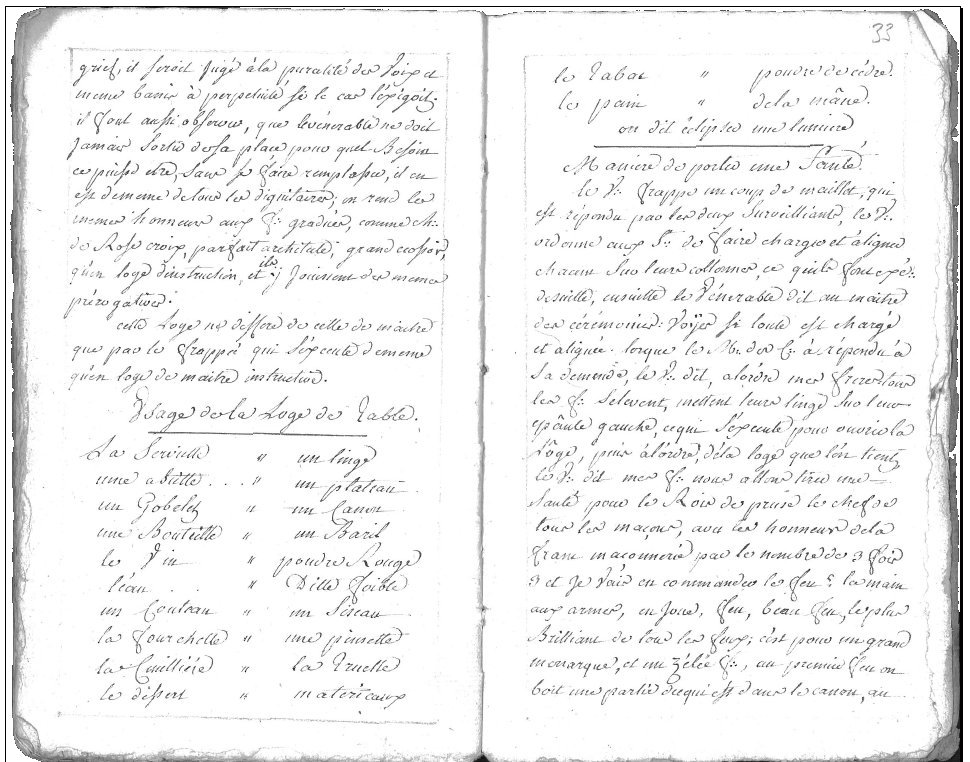 Double page d'un manuscrit maçonnique français daté de 1769. On y remarque la mention du grade de Chevalier Rose-Croix, l'utilisation des abbréviations triponctuées, le langage particulier utilisé pour les banquets, ainsi que la mention d'un toast porté au «Roi de Prusse, le chef de tous les maçons».